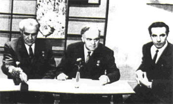 Ю. Эрвье, В. Муравленко и Р. Кузоваткин в Нижневартовской телестудии.